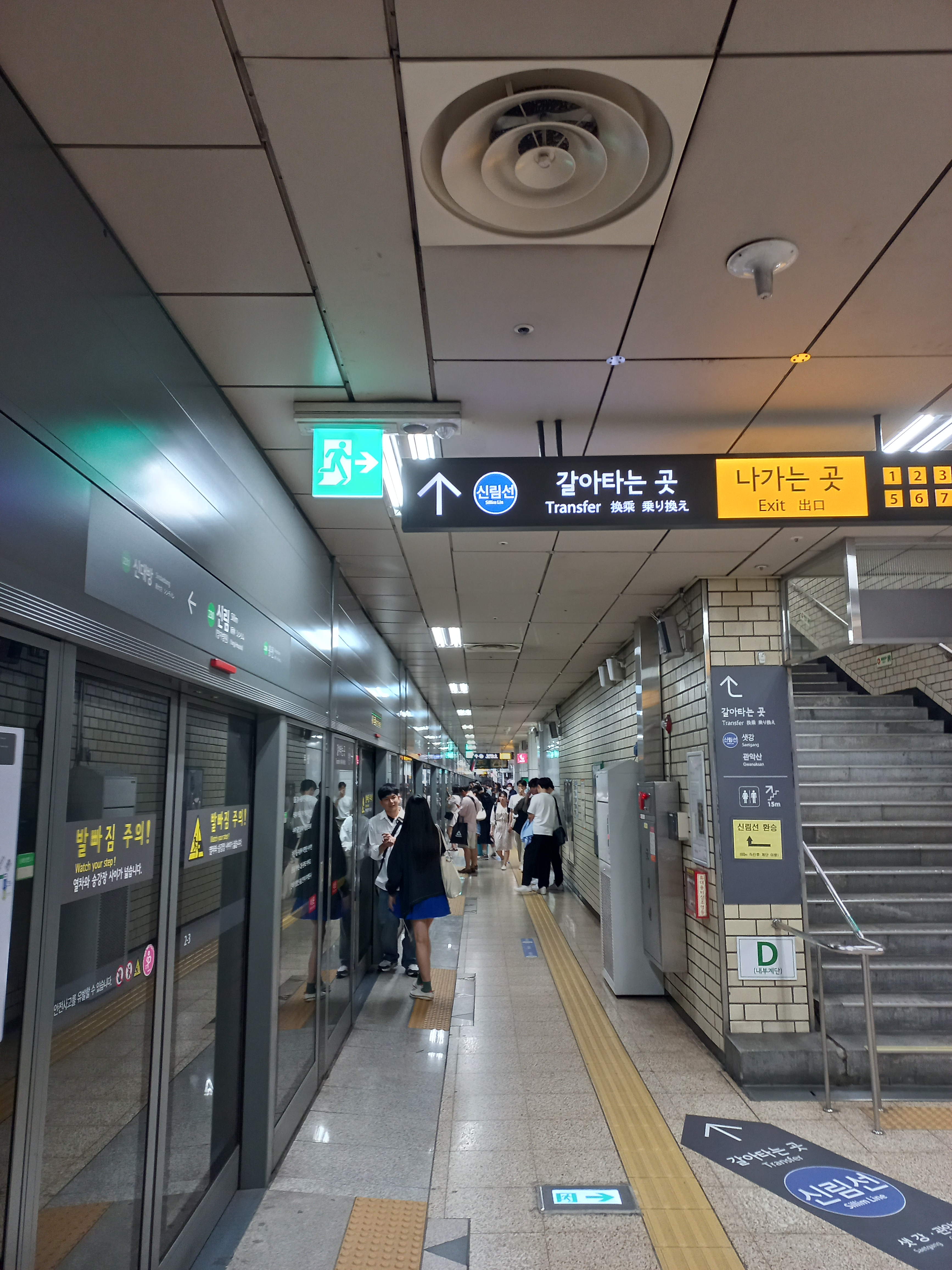 2020년 6월 신림역